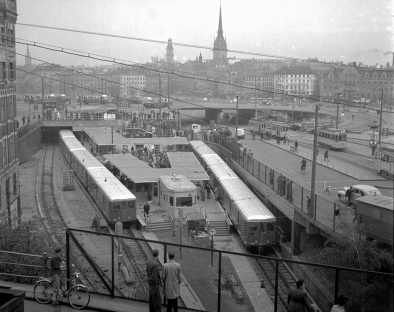 Slussen tunnelbanestation vid invigningen 1 oktober 1950